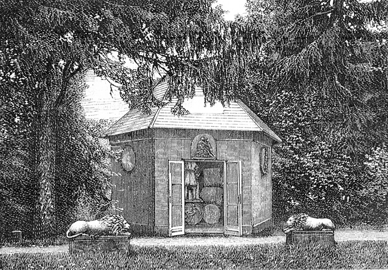 Billedhuggeren Bertel Thorvaldsens atelier på herregården Nysø nordvest for Præstø blev opført 1671-73 for købmanden Jens Lauridsen.